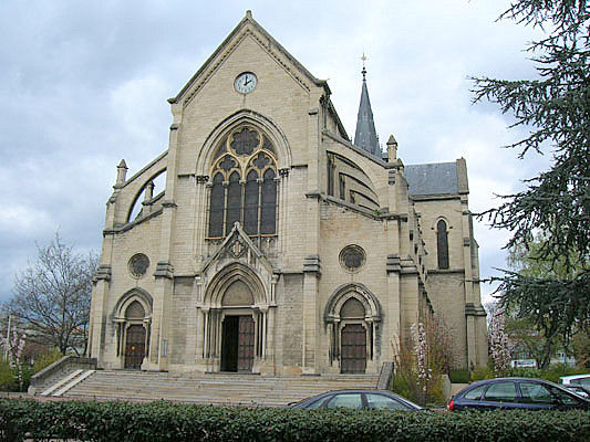 Chapelle Notre Dame des Victoires à Roanne